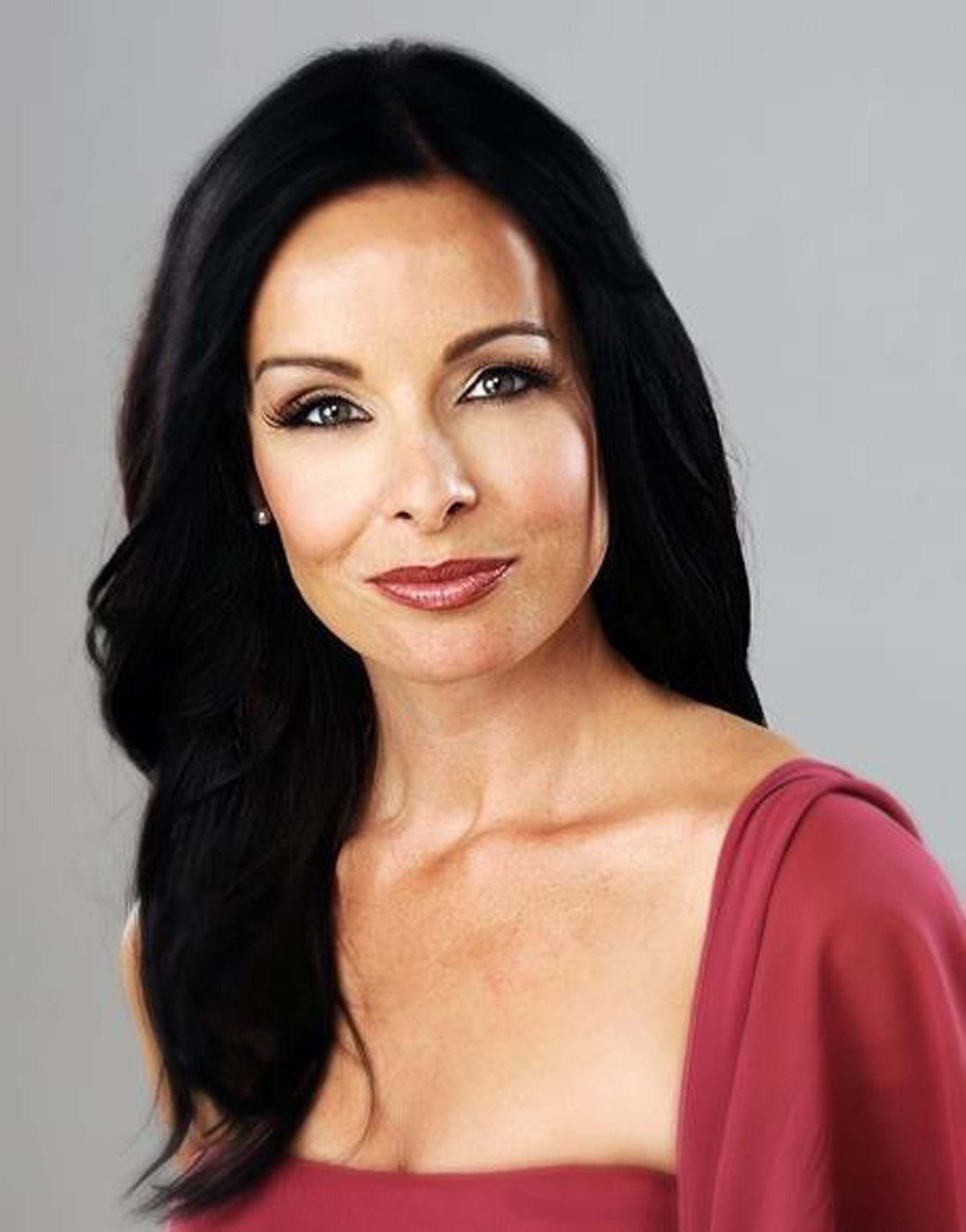 Den svenska musikalartisten Malena Laszlo.